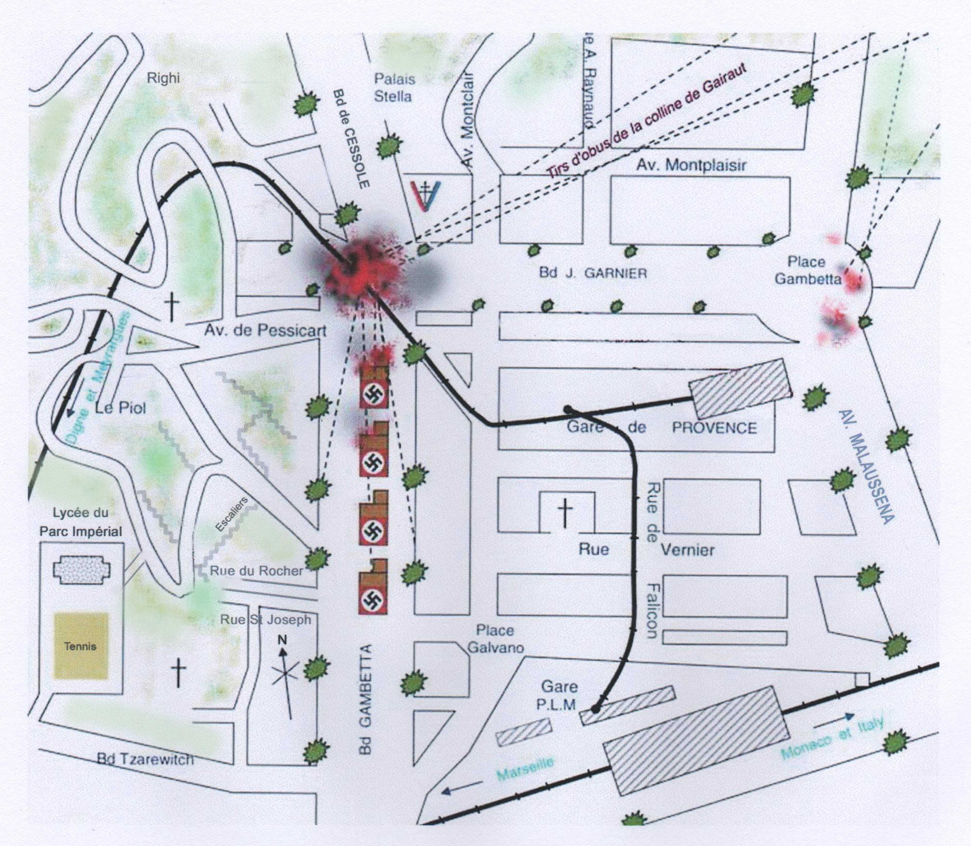 Les hostilités dans le quartier dit du passage à niveau le 28 août 1944 le jour de la libération de la ville de Nice.